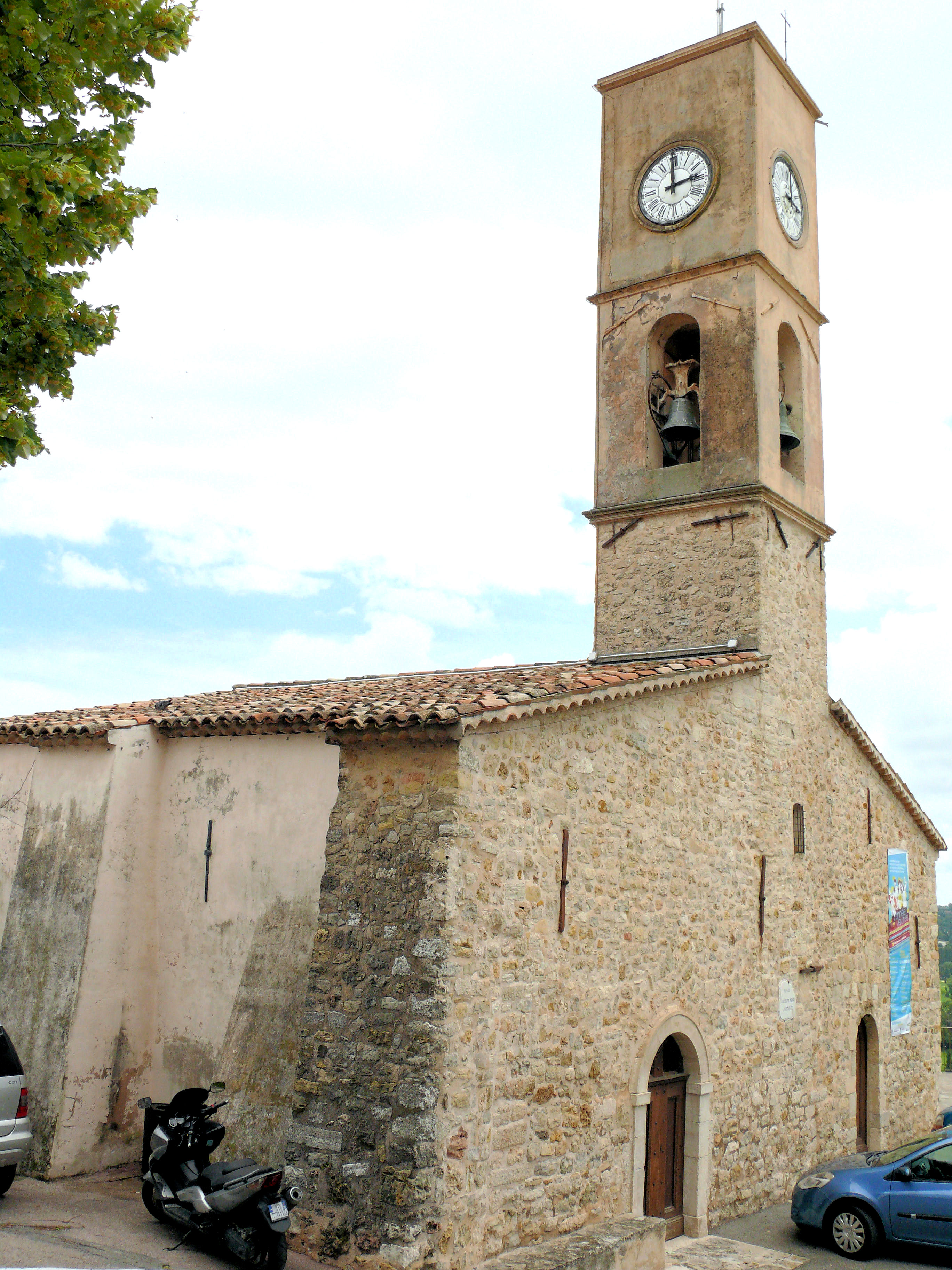 Opio - Eglise Saint-Trophime